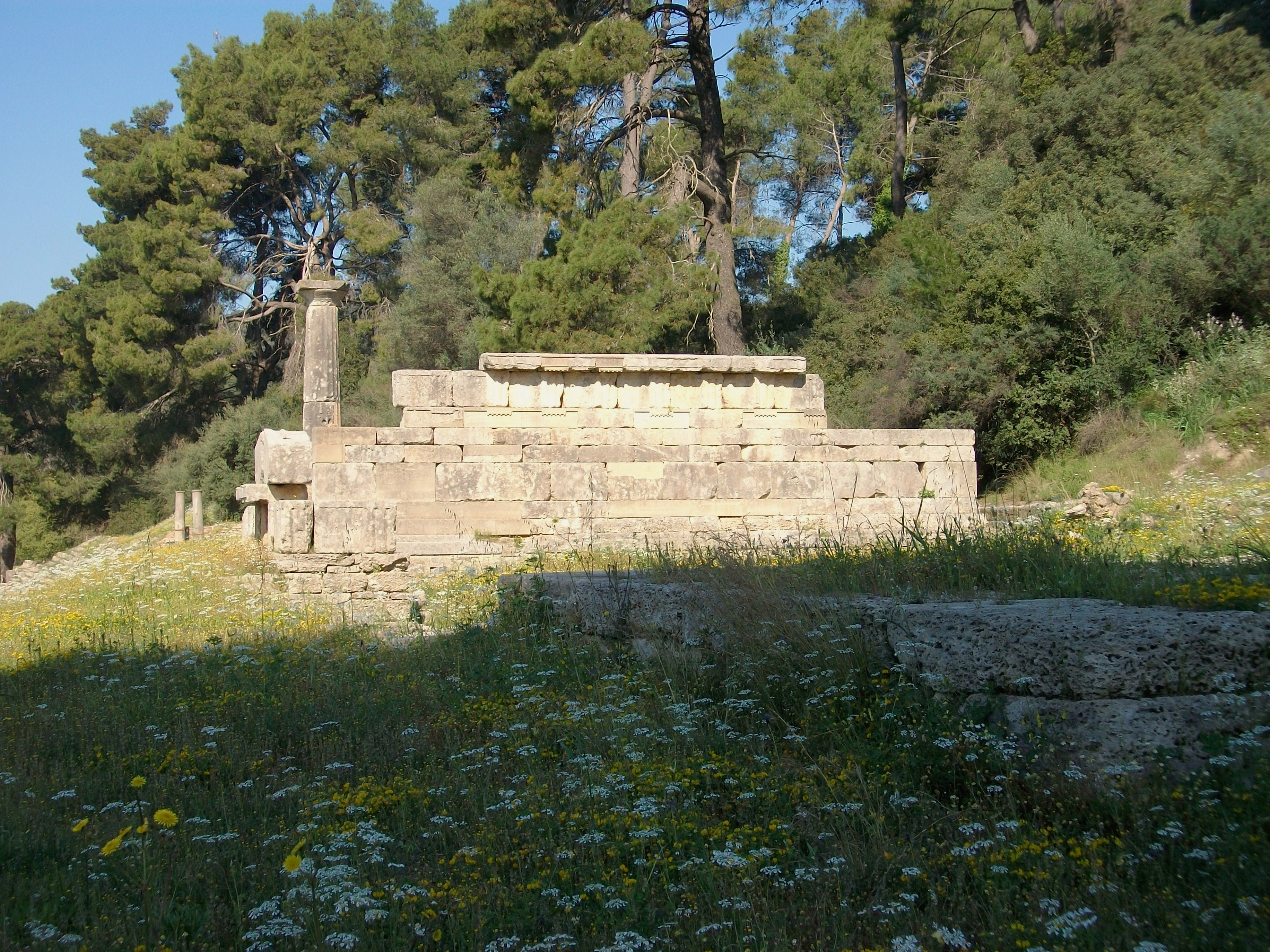 Tresor de Sició, Olímpia.